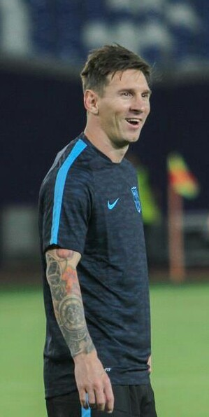 Напередодні матчу за Суперкубок УЄФА у Тбілісі, Грузія.